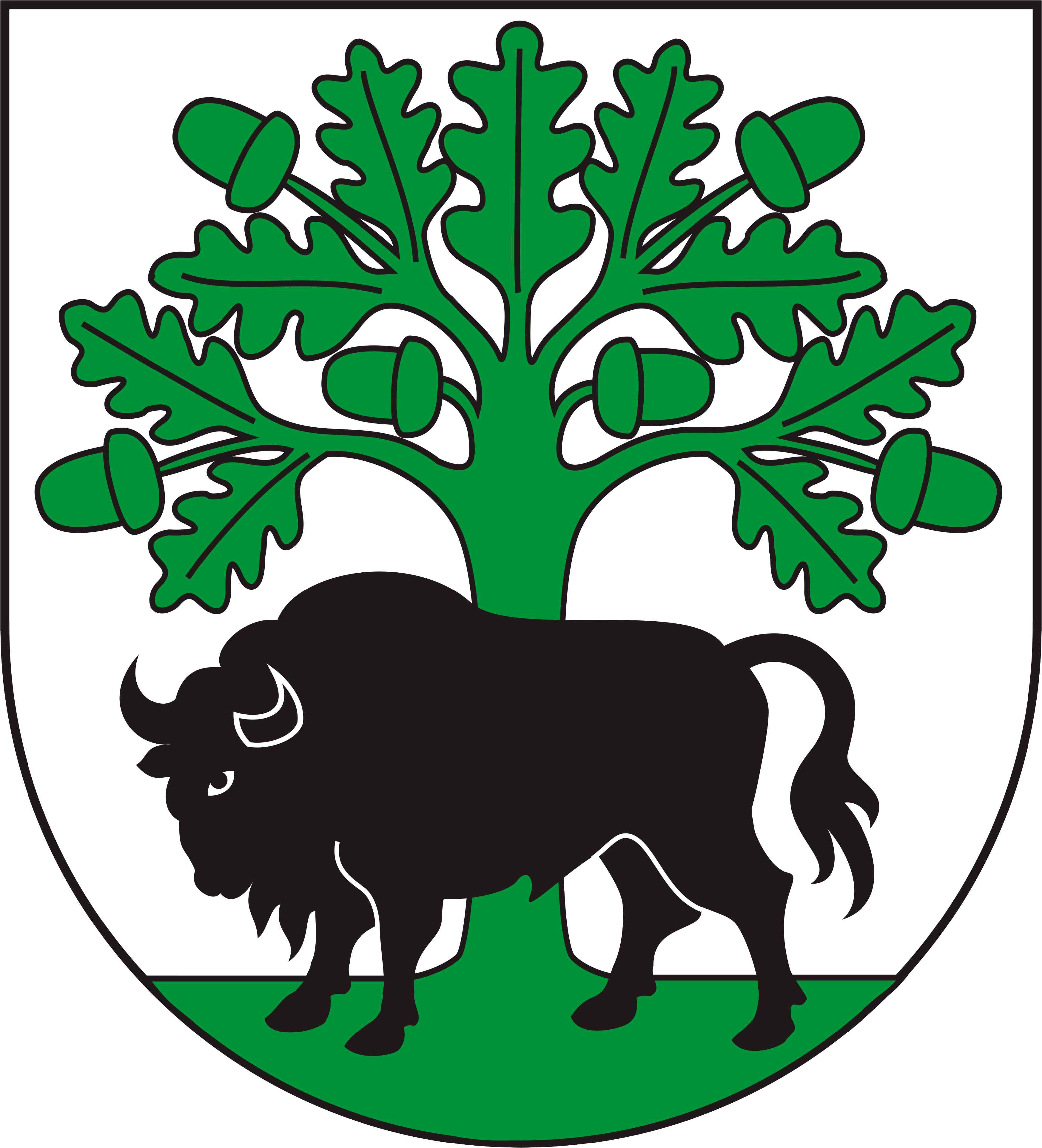 Herb gminy Hajnówka